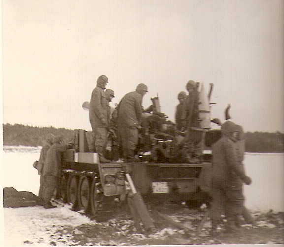 Laden des Geschoß, 96 kg. 4./- bei Übungsschießen mit M110, TrÜbPl Munster-Süd, Winter 1970/71